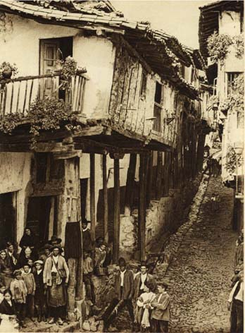 Bildo de komenco de la 20a jarcento.